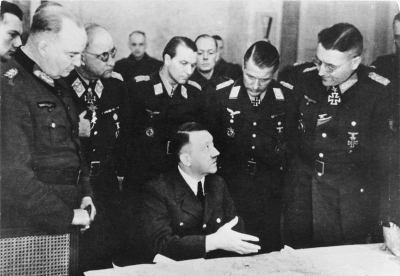 Im Hauptquartier der Heeresgruppe Weichsel Personen hinter Hitler von links: Generalleutnant Wilhelm Berlin; General der Artillerie im OKW Generalfeldmarschall Robert Ritter von Greim; Kommandeur der Luftflotte 6 Generalmajor Franz Reuß; Kommandeur einer Flieger-Div. General der Flakartillerie Job Odebrecht, Kommandierender General des II. Flak-Korps (mot) Generalleutnant Theodor Busse ; Oberbefehlshaber der 9. Armee